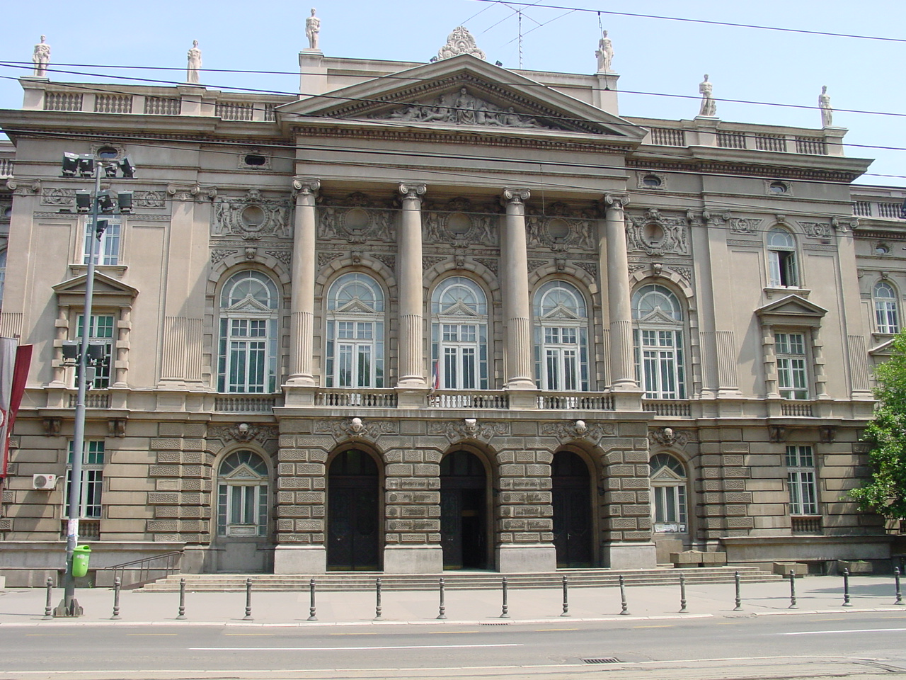 Gradjevinski fakultet